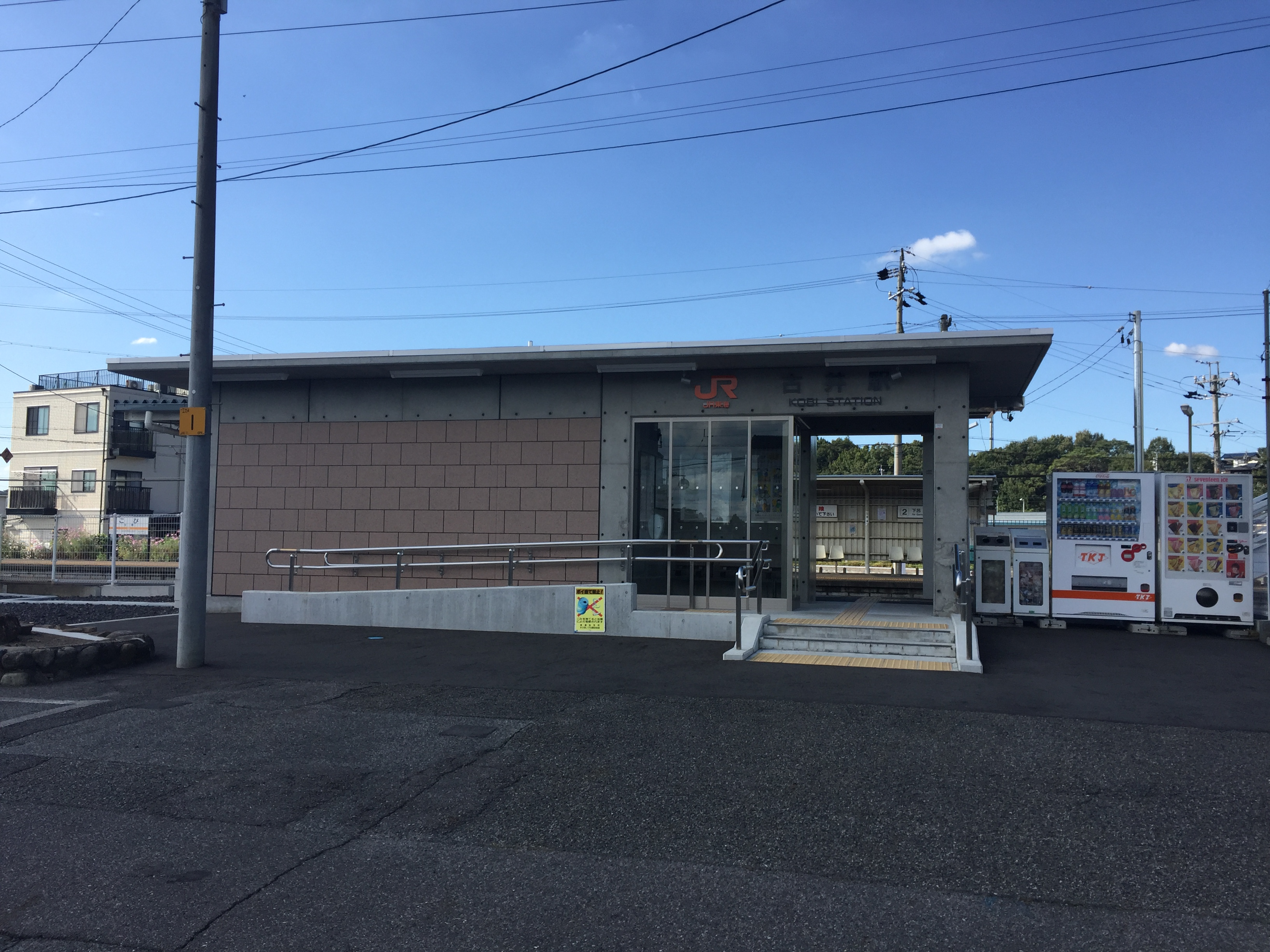 JR高山本線古井駅